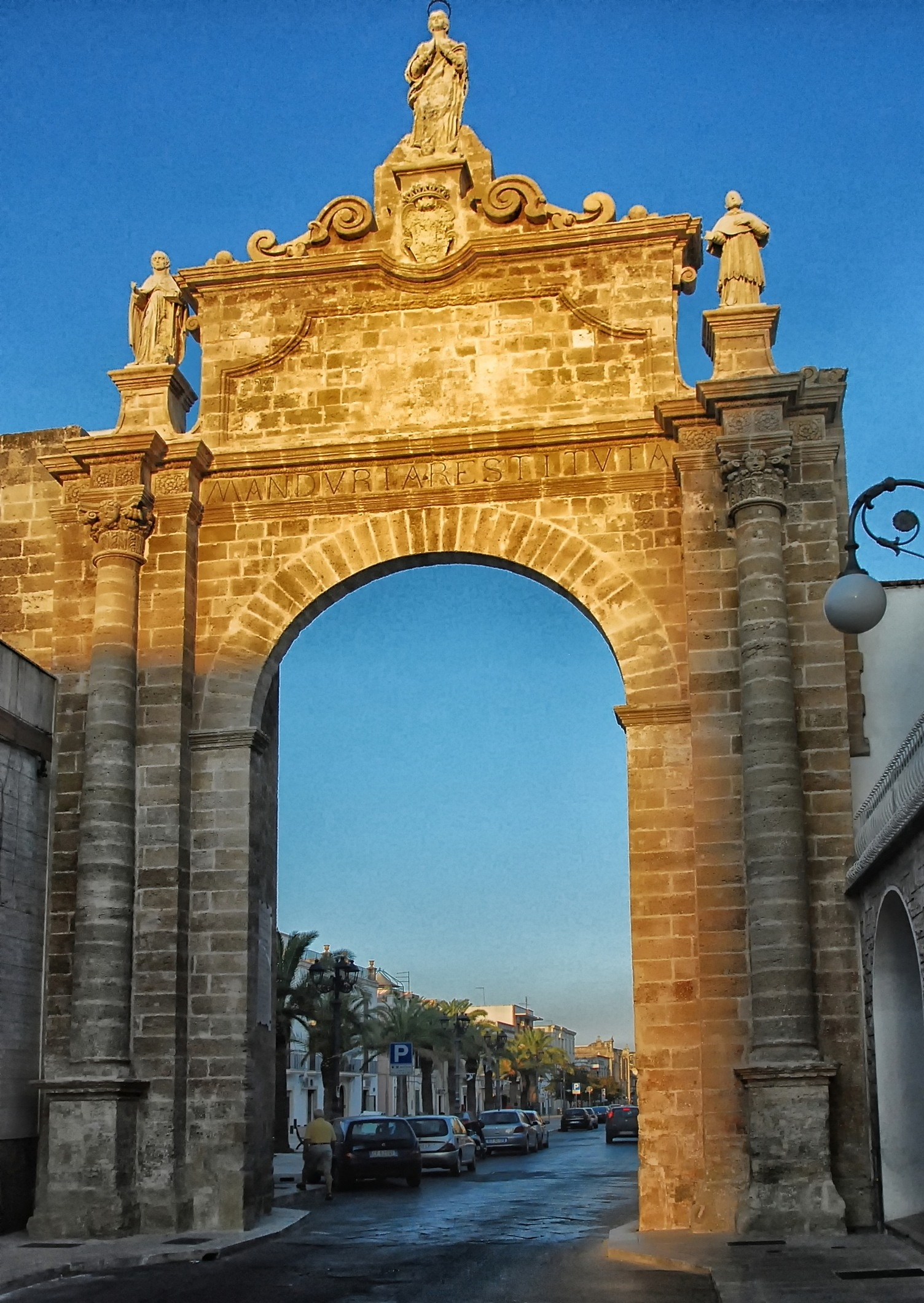 L'Arco di Sant'Angelo o Porta Napoli, si trova all'ingresso occidentale della città in Via XX settembre. Fu realizzata alla fine del '500 quando la città, fu posta sotto la protezione della Vergine Immacolata. Nel 1665 sulla sommità furono sistemate tre statue: L'immacolata, San Gregorio al centro e San Carlo Borromeo. Sull'architrave fu incisa sempre nello stesso periodo, l'iscrizione:" Manduria Restituita". This is a photo of a monument which is part of cultural heritage of Italy.